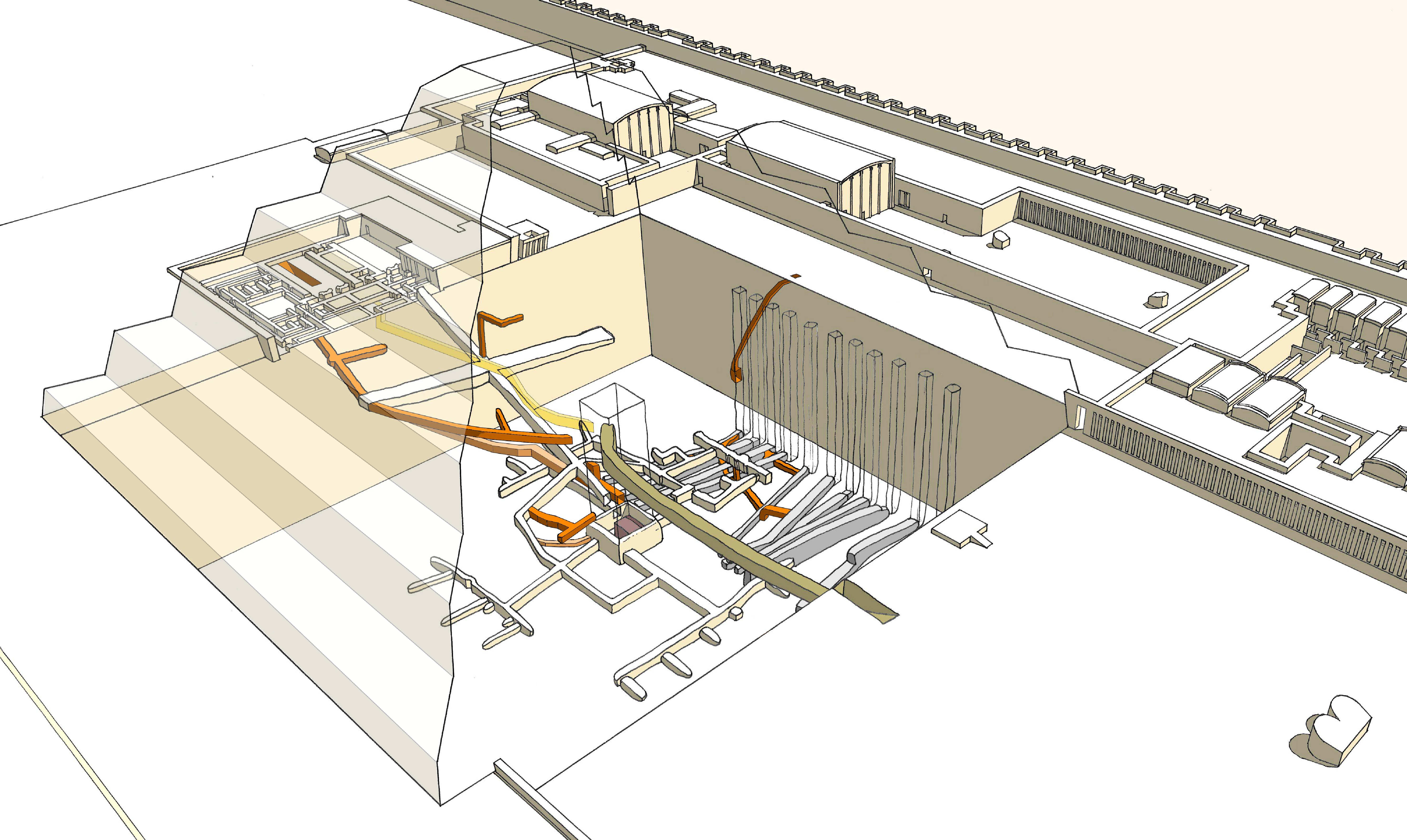 Vue générale des appartements funéraires de la pyramide de Djoser à Saqqarah. Passages des explorateurs et des voleurs (En vert, jaune et orange).